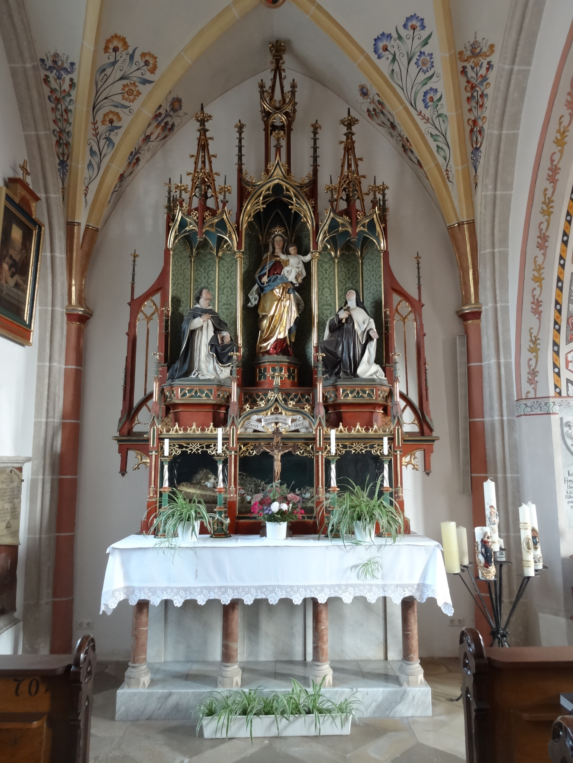 Linker Seitenaltar in der Pfarrkirche St. Johann in Seyboldsdorf (Stadt Vilsbiburg, Lkr. Landshut)